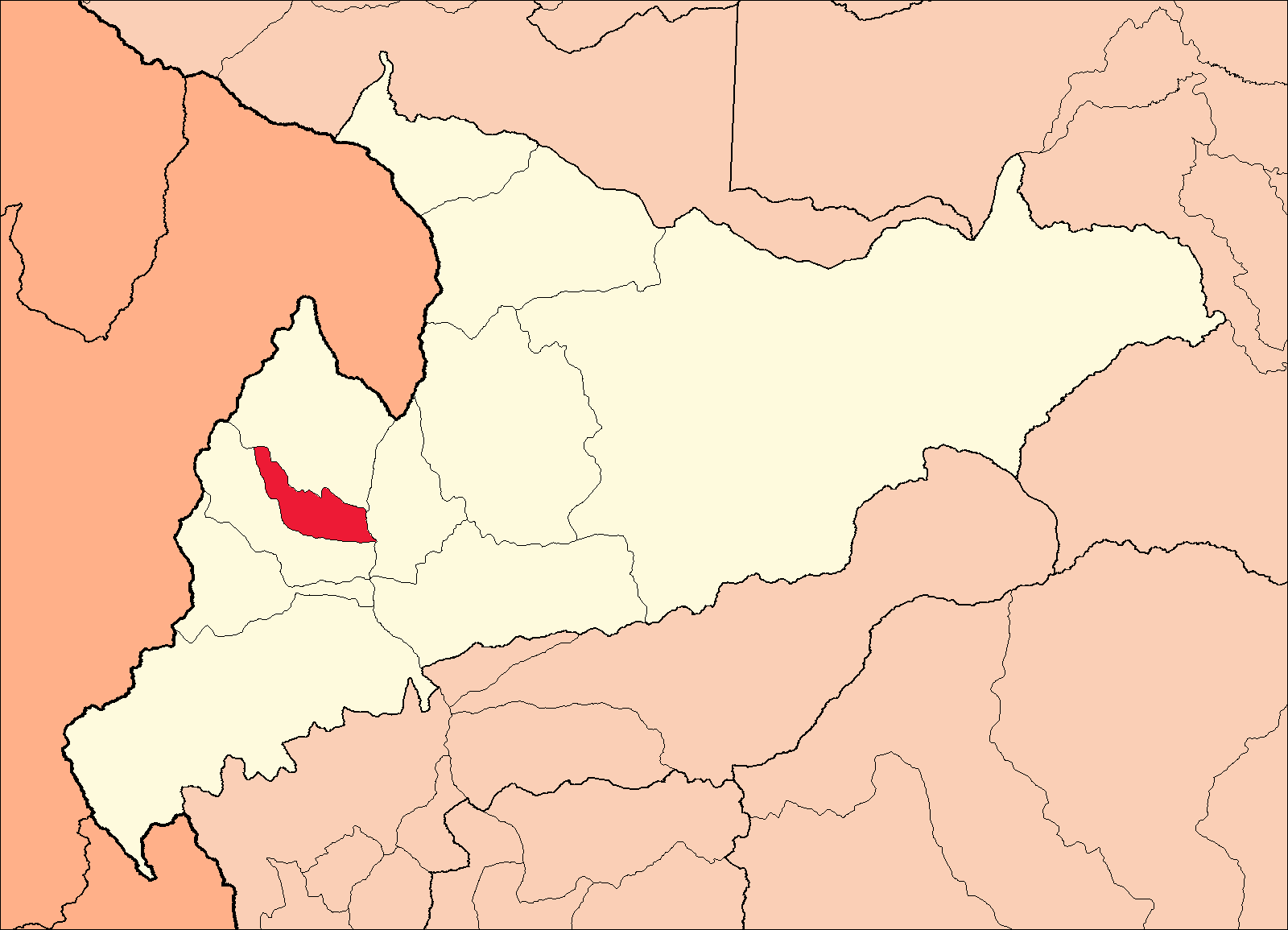 Área del distrito de Punchao dentro de la provincia de Huamalíes.